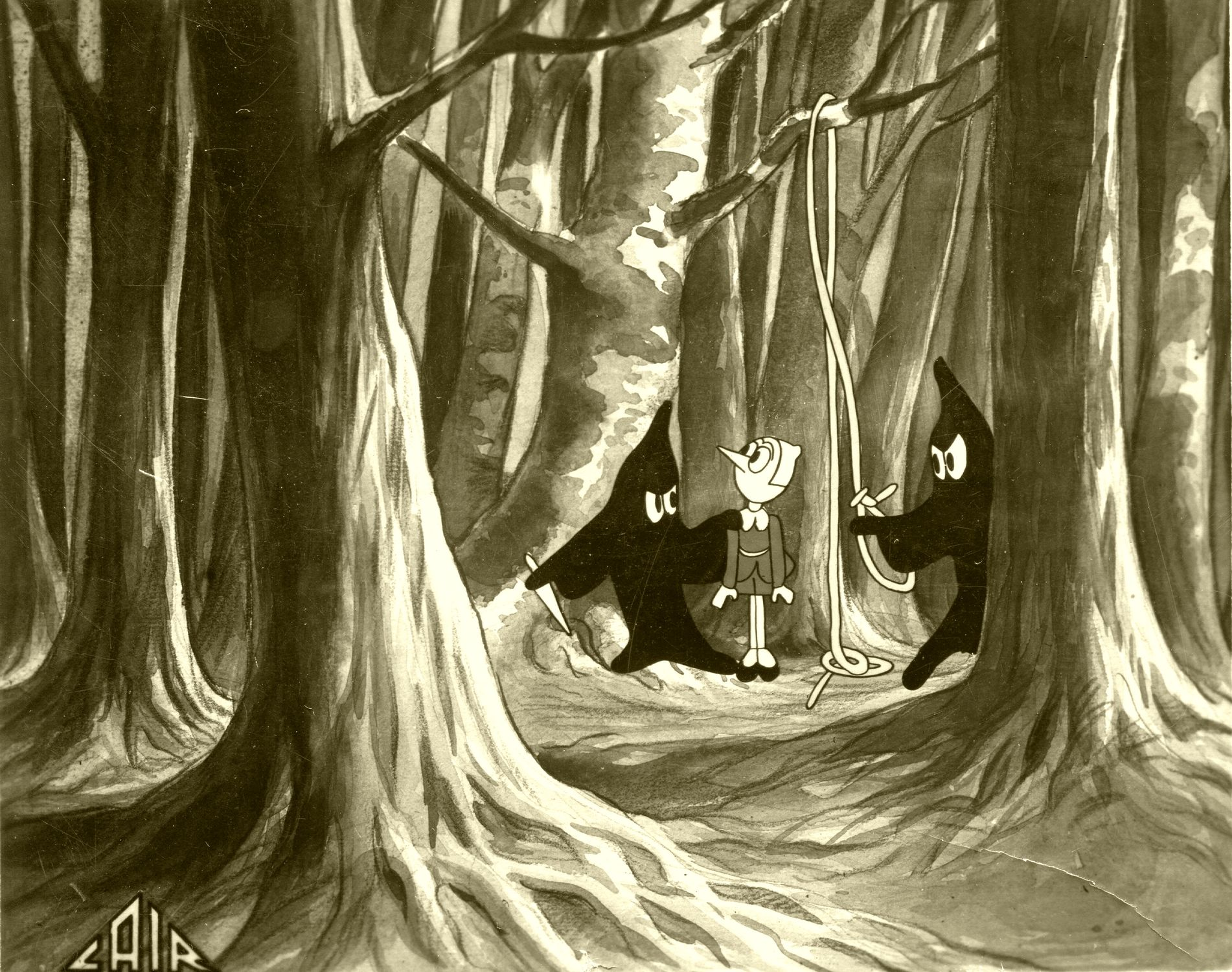 Scena tratta dal film d'animazione "Le Avventure di Pinocchio" - Italia, 1936